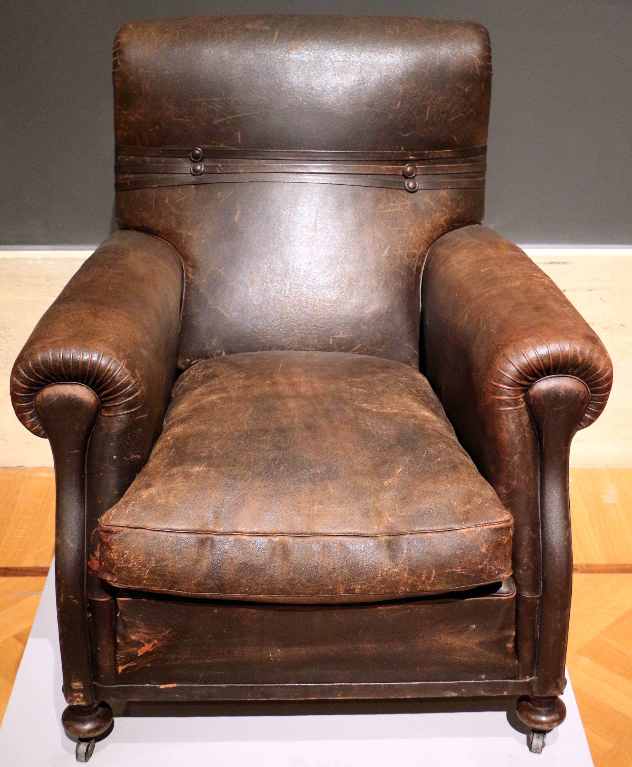 Corporate art exhibition (Galleria nazionale d'arte moderna 2015) This is a photo of a monument which is part of cultural heritage of Italy.